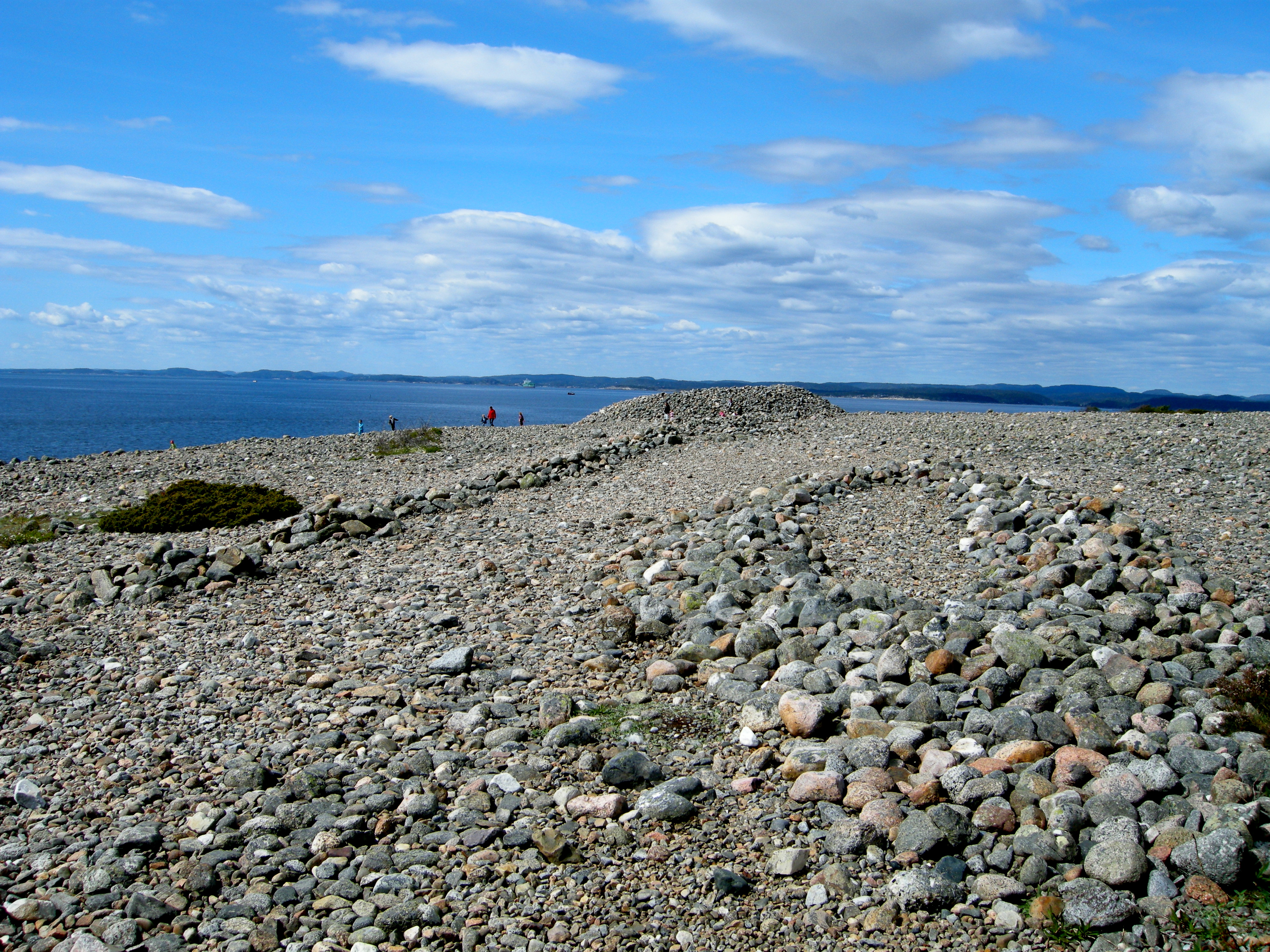 Gravhaug på Mølen, Larvik